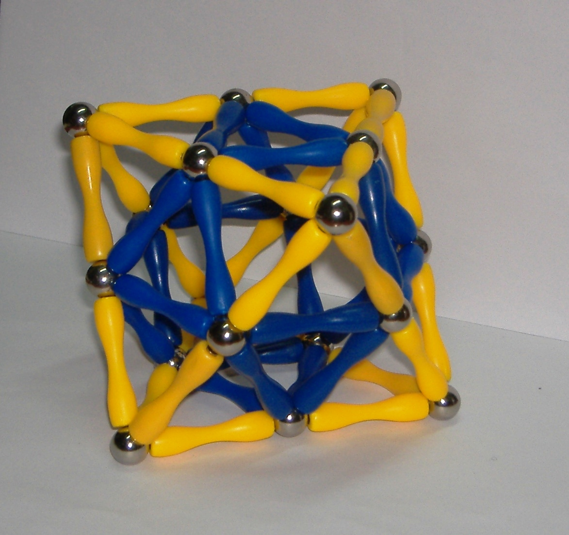 דגם של אוקטהדרון מתוקן (דהיינו, קובוקטהדרון)